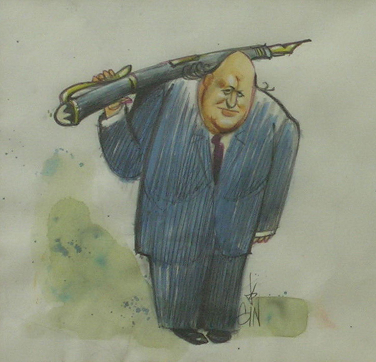 Josep M. Cadena vist pel dibuixant Gin